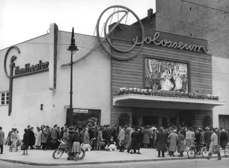 Berlin, Schönberger Allee, Kino "Colosseum" Zentralbild Hesse 3.5.1957 Eröffnung des modernsten Kino Berlins Am 2. Mia 1957 wurde in der Schönberger Allee in Berlin das Colosseum-Filmtheater eröffner, das für die Vorführungen von Filmen in Totalvision (Cinemascoope) eingerichtet ist und 819 Zuschauern auf Schaumgummi-gepolsterten Sesseln Platz bietet. UBz: Das Filmtheater Coloseum, in dem jetzt der DEFA-Totalvision-Fim "Mazurka" der Liebe gezeigt wird.